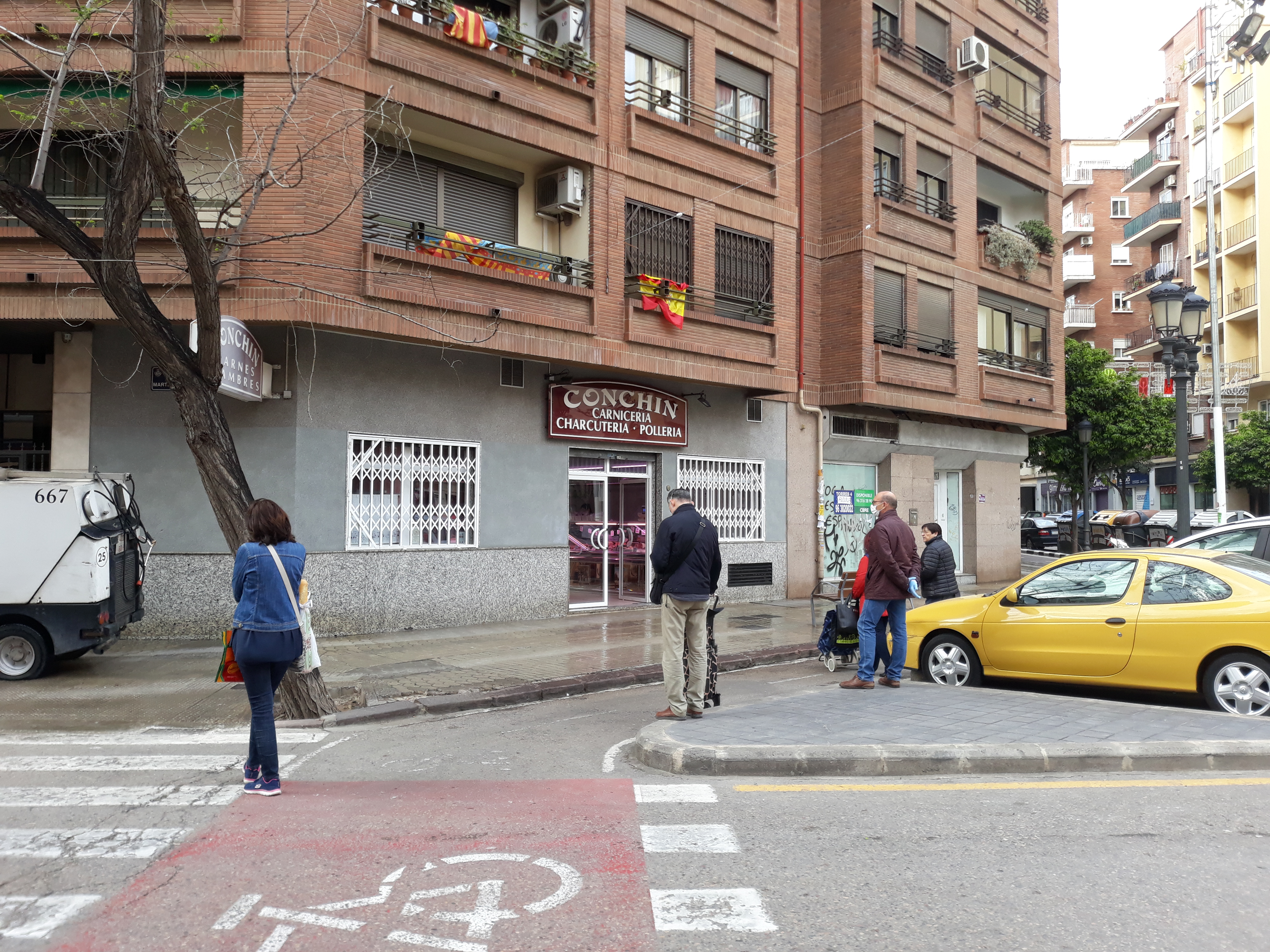 2020-03-Detalls i conseqüències del COVID-19 al País Valencià